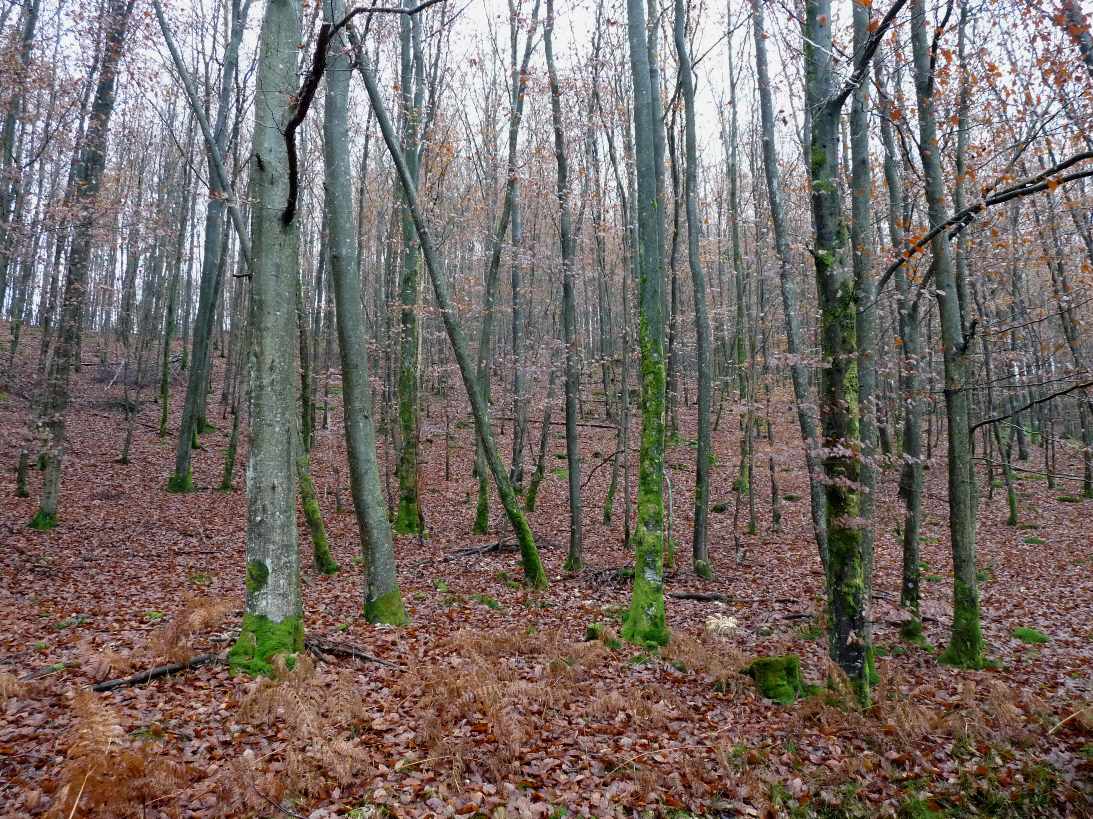 Forêt domaniale de La Petite-Pierre Sud (Bas-Rhin) en automne.